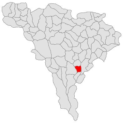 Categorie:Hărţi ale judeţului Alba